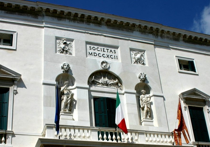 Teatro La Fenice di Venezia particolare della facciata.